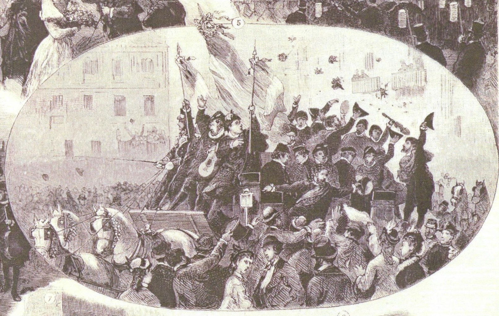 La troupe de l'Estudiantina Espagnola défile en voiture dans Paris.